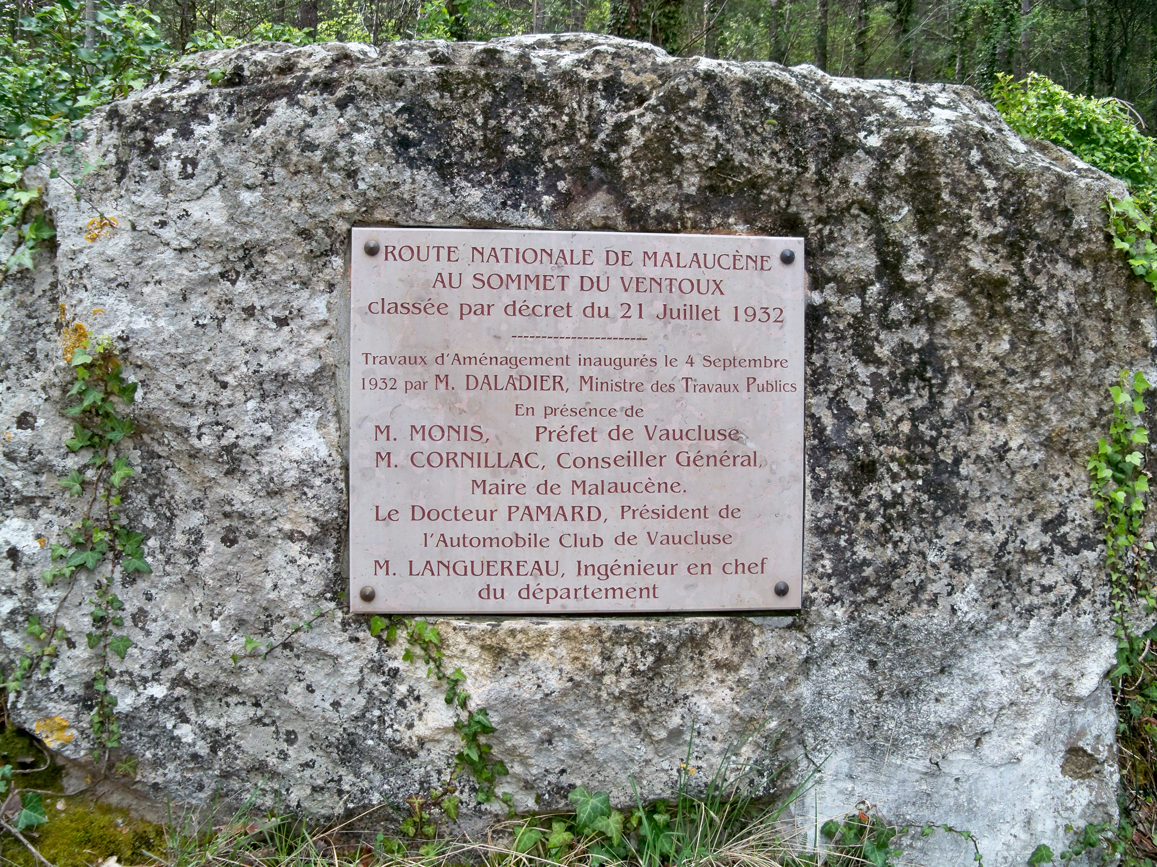 route vers le Mont Ventoux, à la source du Groseau, Malaucène